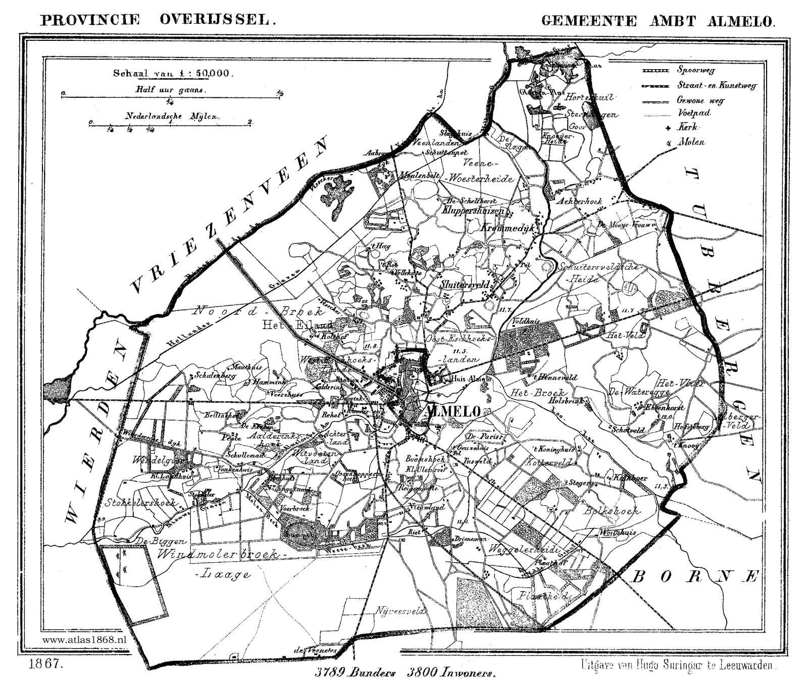 Kaart van Ambt Almelo uit Gemeente Atlas van Nederland, J. Kuyper 1865-1870, Uitgave Hugo Suringar Leeuwarden.